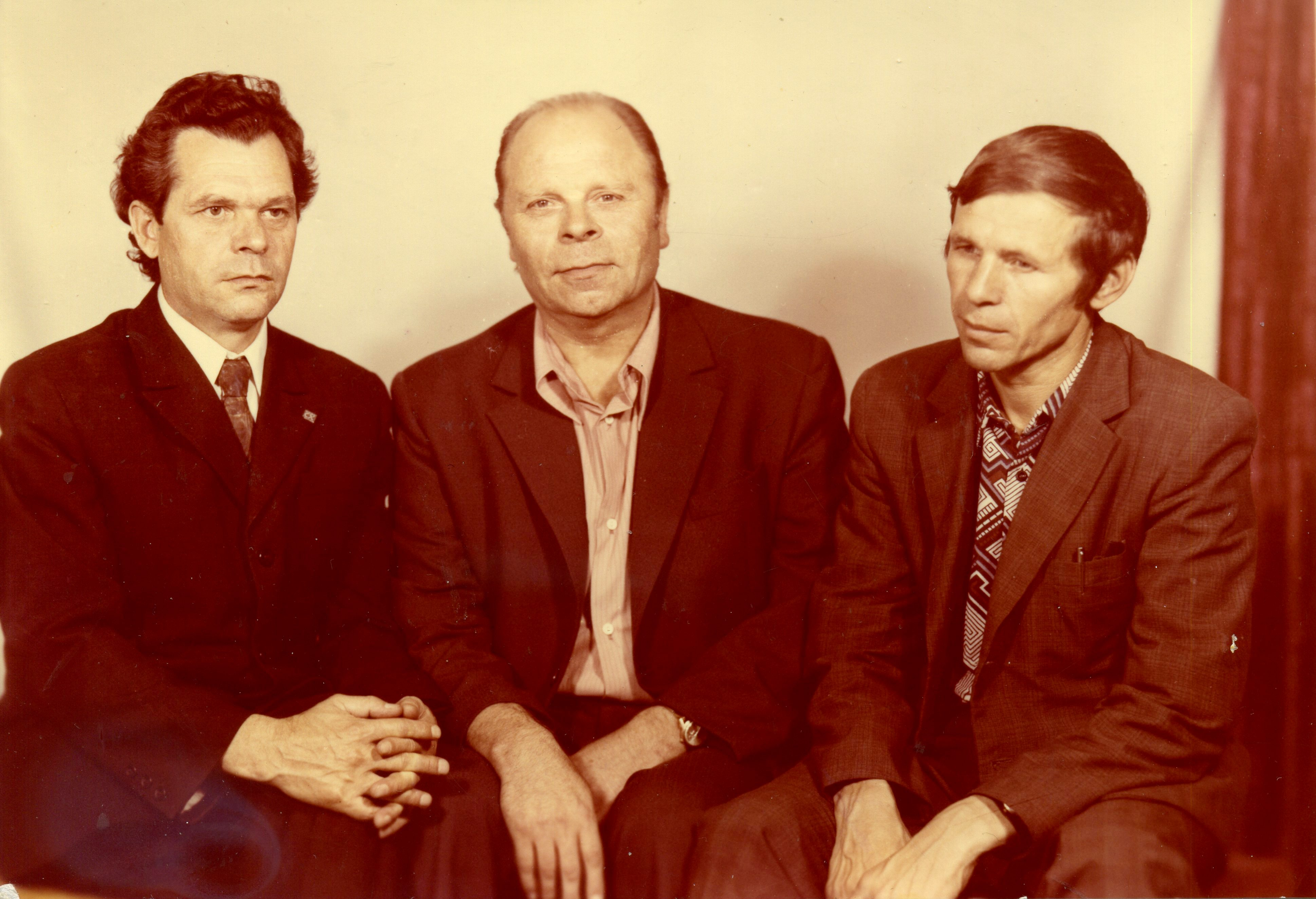 На фото слева направо: 1. Колбин Б.М. - директор художественного Фонда г. Кургана. 2. Козырев А.И. 3. Лохматов И.Я. - член Союза художников. Август 1974 г. г. Курган.